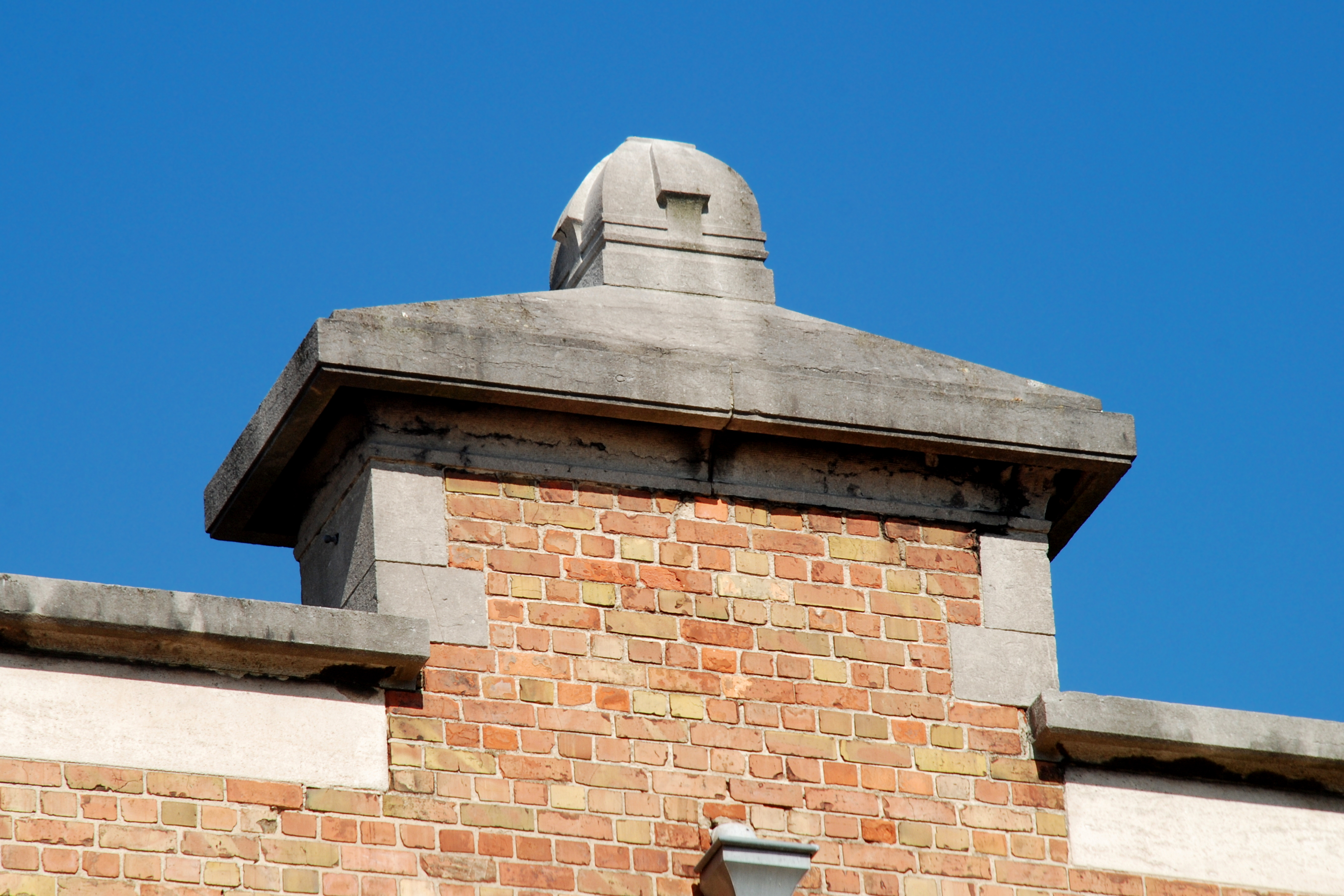 Belgique - Bruxelles - Centre scolaire du Souverain